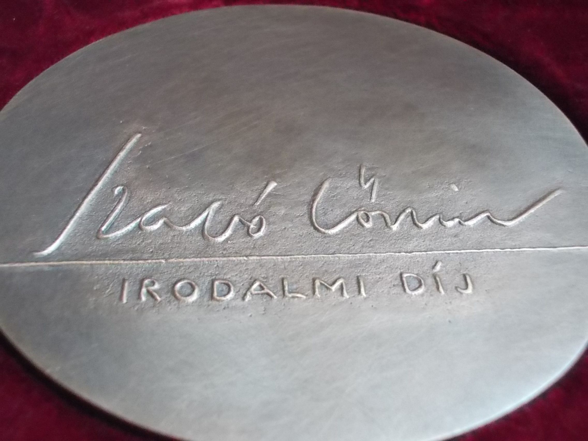 Szabó Lőrinc literary award